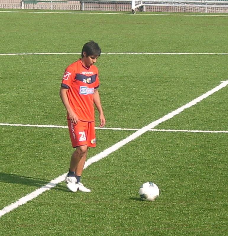 Pablo Barrientos al cento sportivo di Torre del Grifo Village